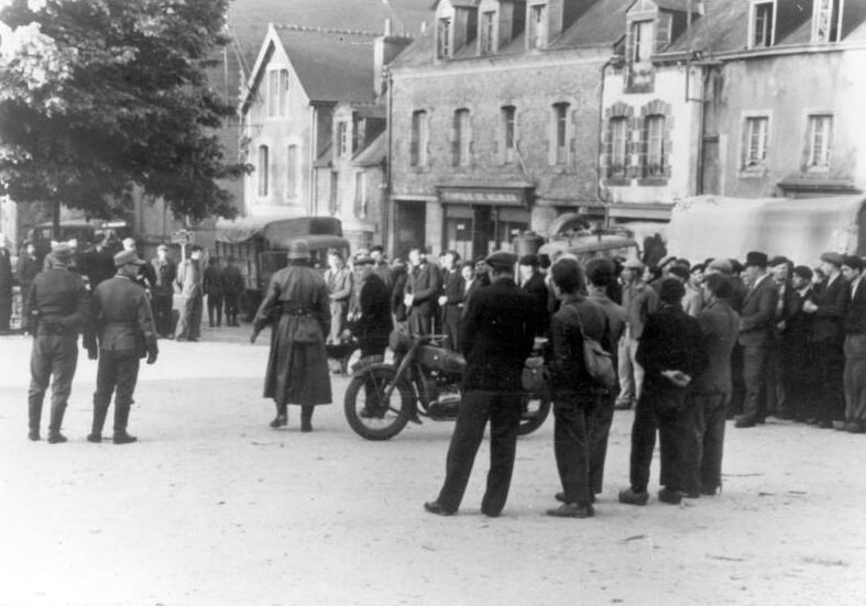 Der rote Maquis in Frankreich Die Sabotageakte der letzten Zeit machte eine genaue Kontrolle aller männlichen Personen notwendig. Sie wurden auf den Marktplatz geführt, wo zunächst aufgrund der Personalpapiere eine grobe Sichtung der Männer vorgenommen wird. Foto: Kriegsberichter Koll